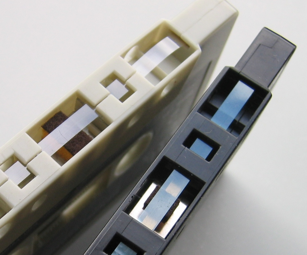 Verschiedene Bandkissen einer Compact Cassette